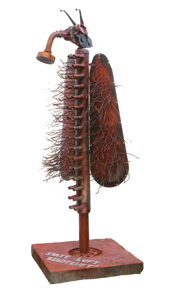 Foto der Skulptur von Irma Hünerfauth "Stattluft-Stadtluft